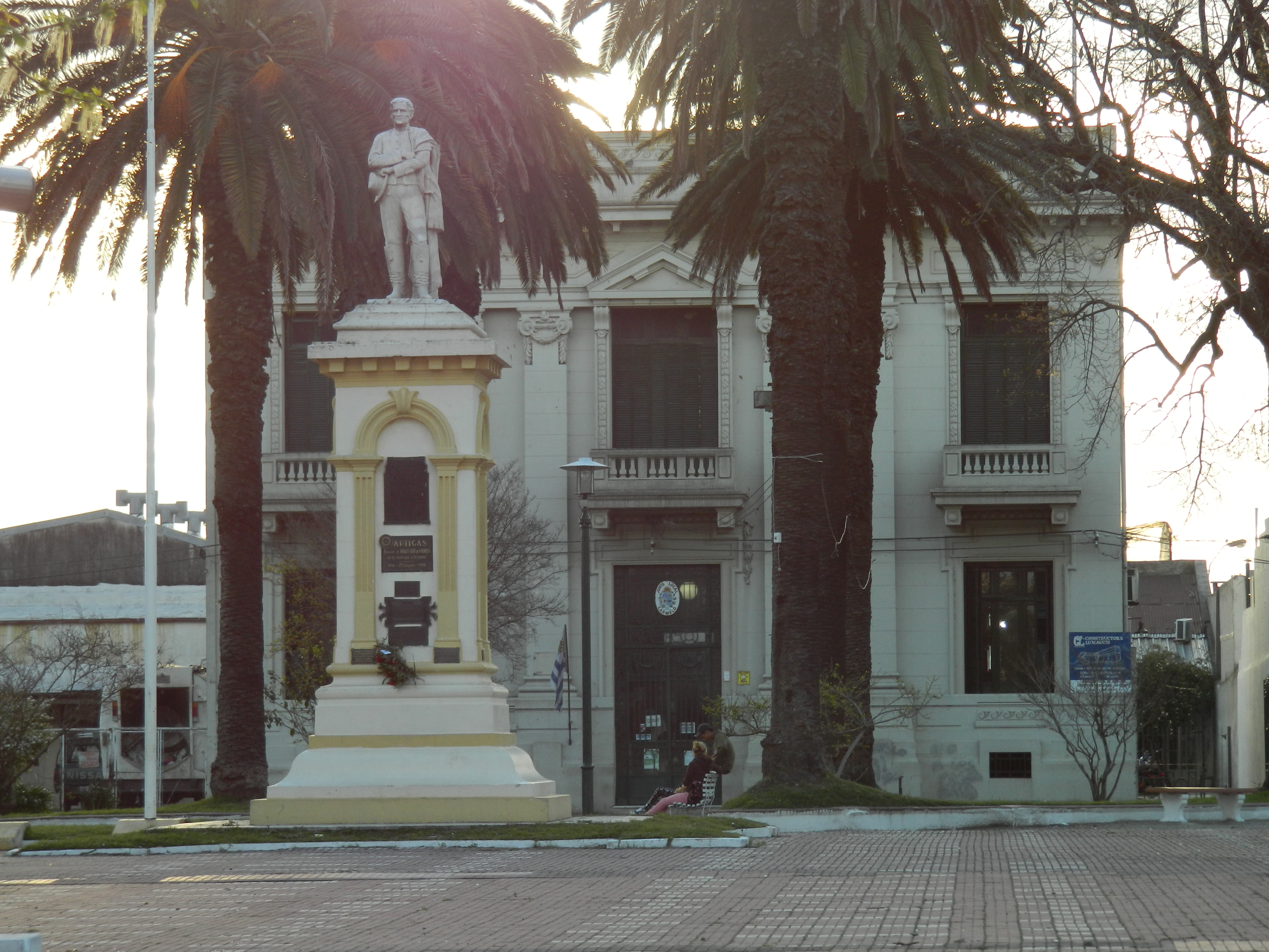 Monumento a Artigas (Carmelo). Ubicada en el departamento de Colonia